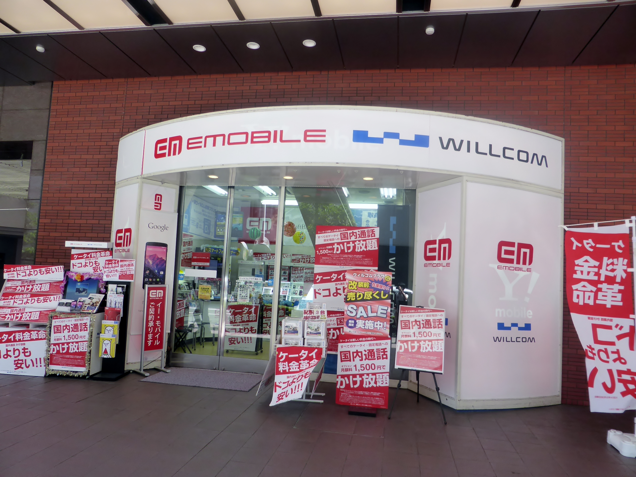 ワイモバイル株式会社設立後に看板が替えられたウィルコムプラザ梅田OSを撮影。看板の下に「Y!Mobile」の看板がつけられている。